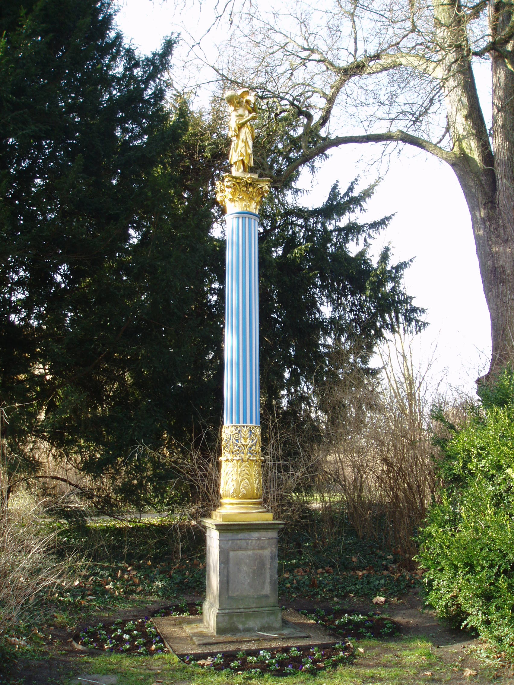 Säule in den bayerischen Wappenfarben aus weißen und blauen schlesischen Glasröhren mit vergoldetem Zinkgusskapitell.